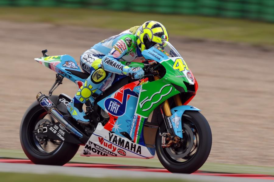 Rossi en el Gran Premio de Holanda en Assen, 2007. Valentino Rossi en la Yamaha M1 "Cinquecento".